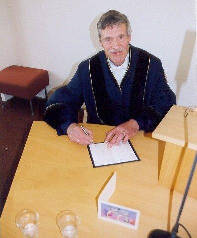 trouwambtenaar ondertekent het trouwboekje tijdens de trouwceremonie